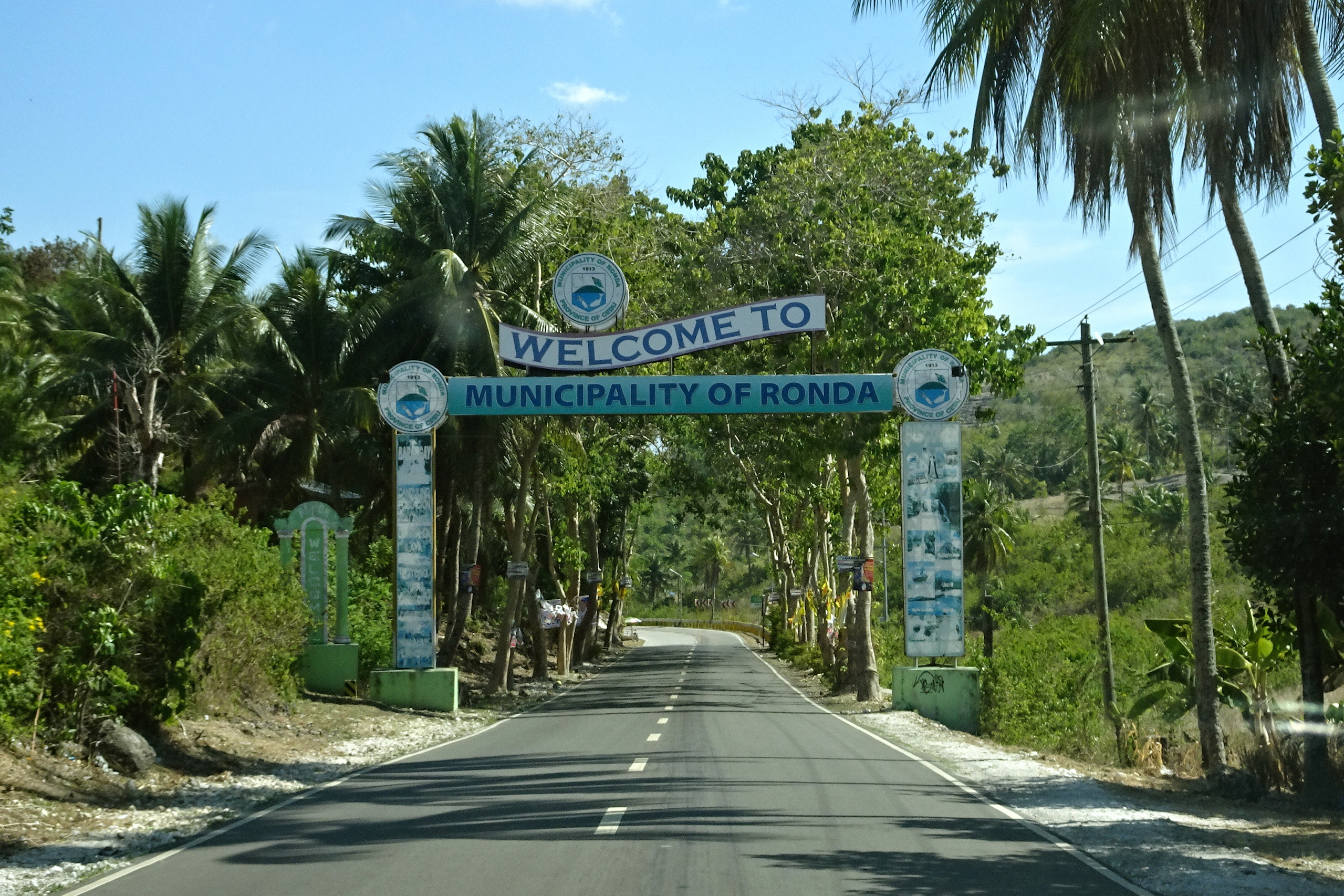 Ronda, Cebu, Philippines